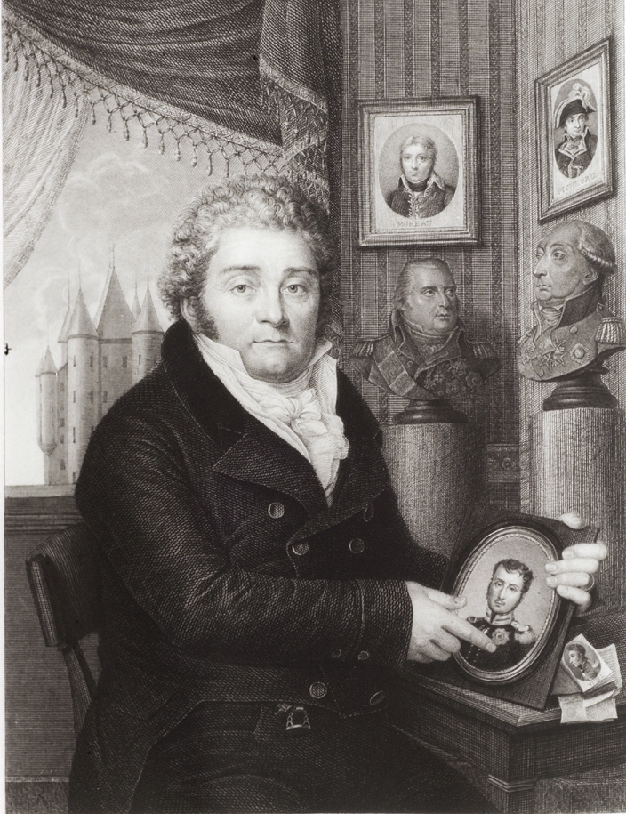 Der schweizer Royalist, Drucker und Buchhändler Louis Fauche-Borel (1762-1829)